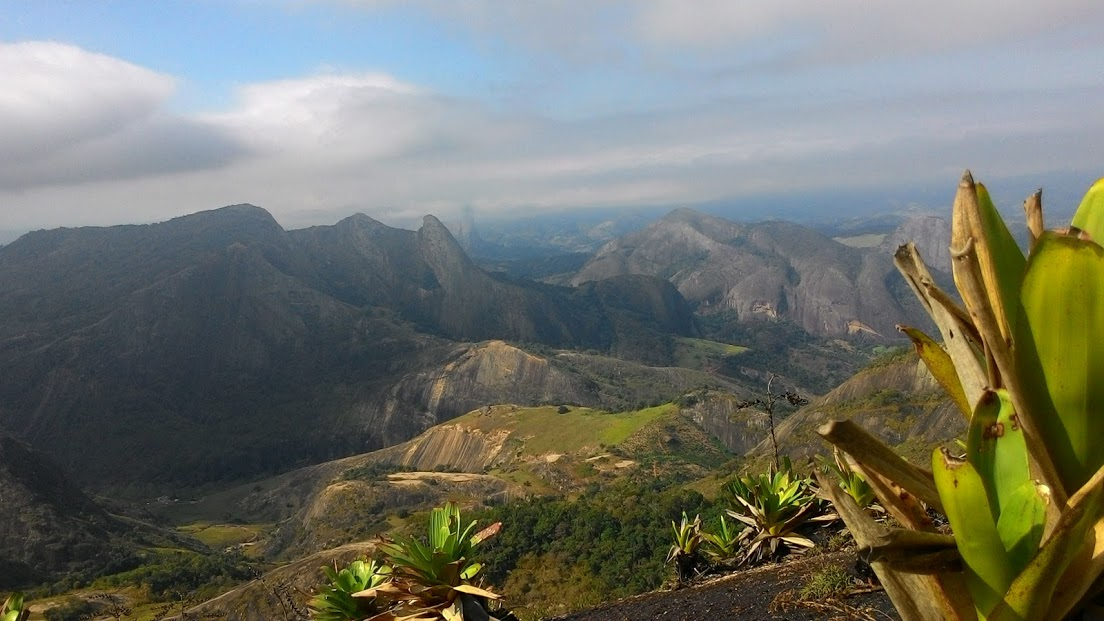 Vista da Pedra da Lajinha, Afonso Cláudio, Espírito Santo